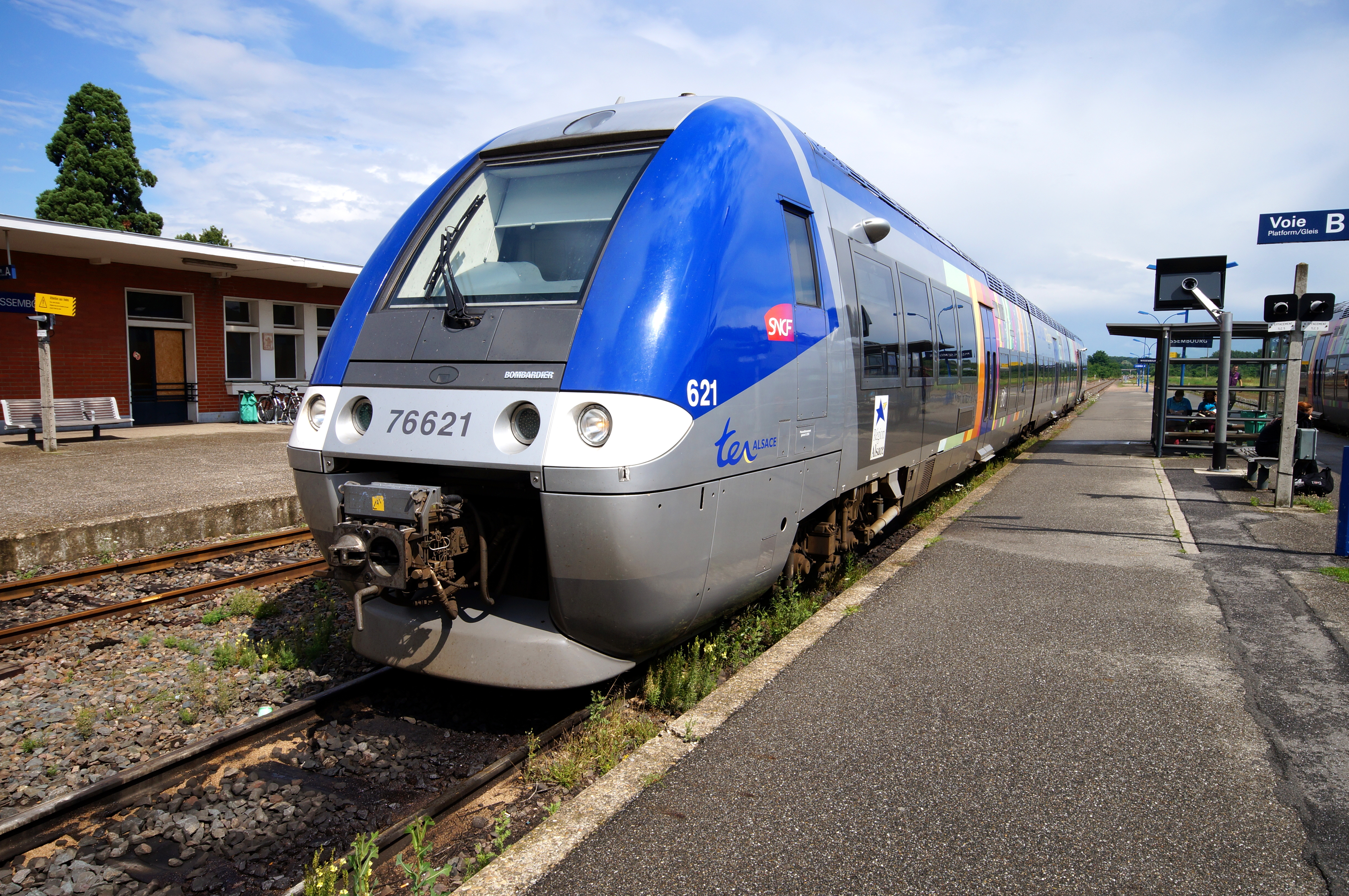 Autorail à grande capacité (Baureihe SNCF X 76500) im Bahnhof Wissembourg in Frankreich